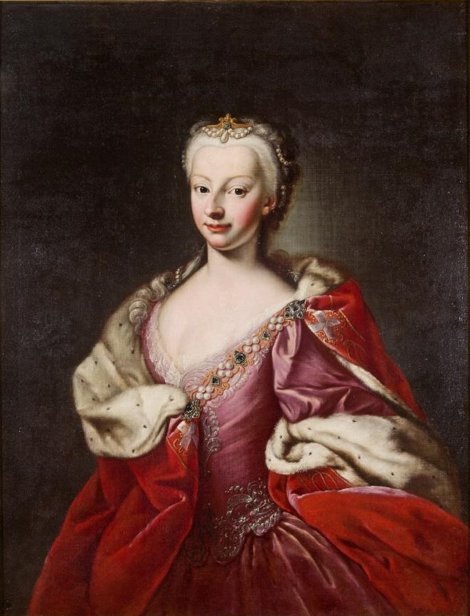 Retrato de la reina Polixena Cristina de Hesse-Rotenburg (1706-1735), que fue reina consorte de Cerdeña por su matrimonio con el rey Carlos Manuel III de Cerdeña.